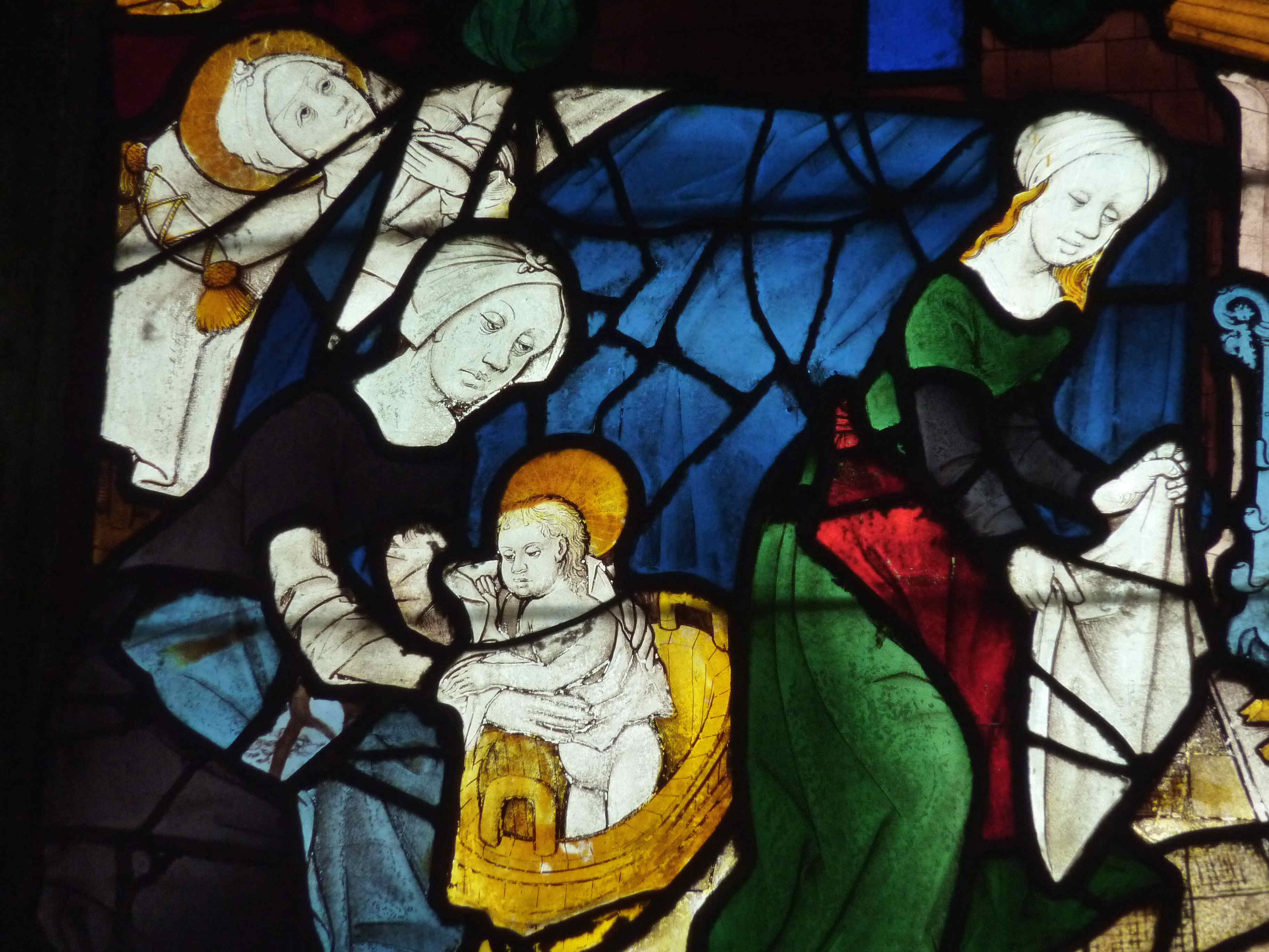 Katholische Kirche Saint-Pierre in Dreux im Département Eure-et-Loir (Centre-Val de Loire/Frankreich), Bleiglasfenster (baie 5) aus dem frühen 16. Jahrhundert im Chor; Darstellung: Geburt und Kindheit Marias; Ausschnitt: Geburt Marias